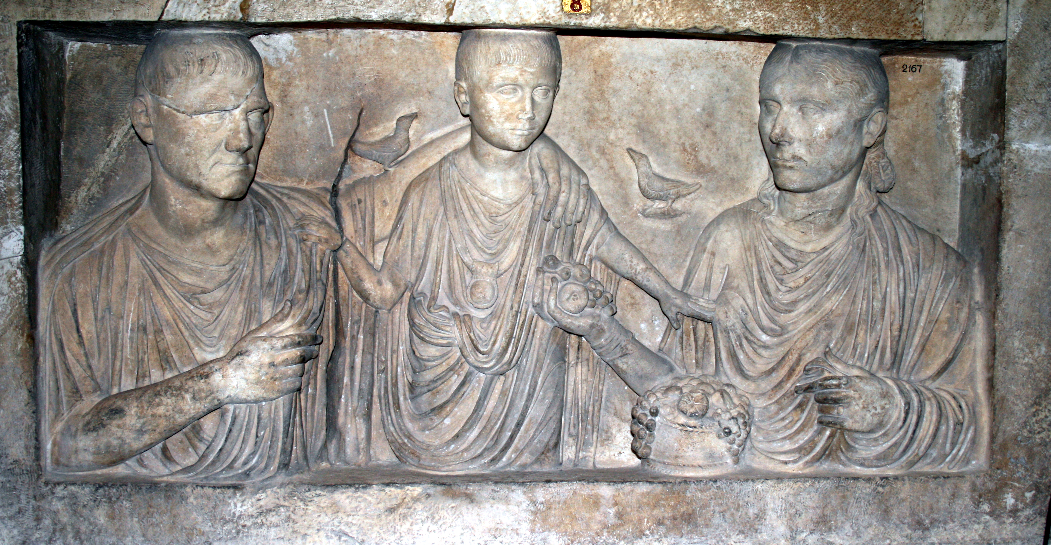 Grabstein einer römischen Familie aus den Vatikanischen Museen